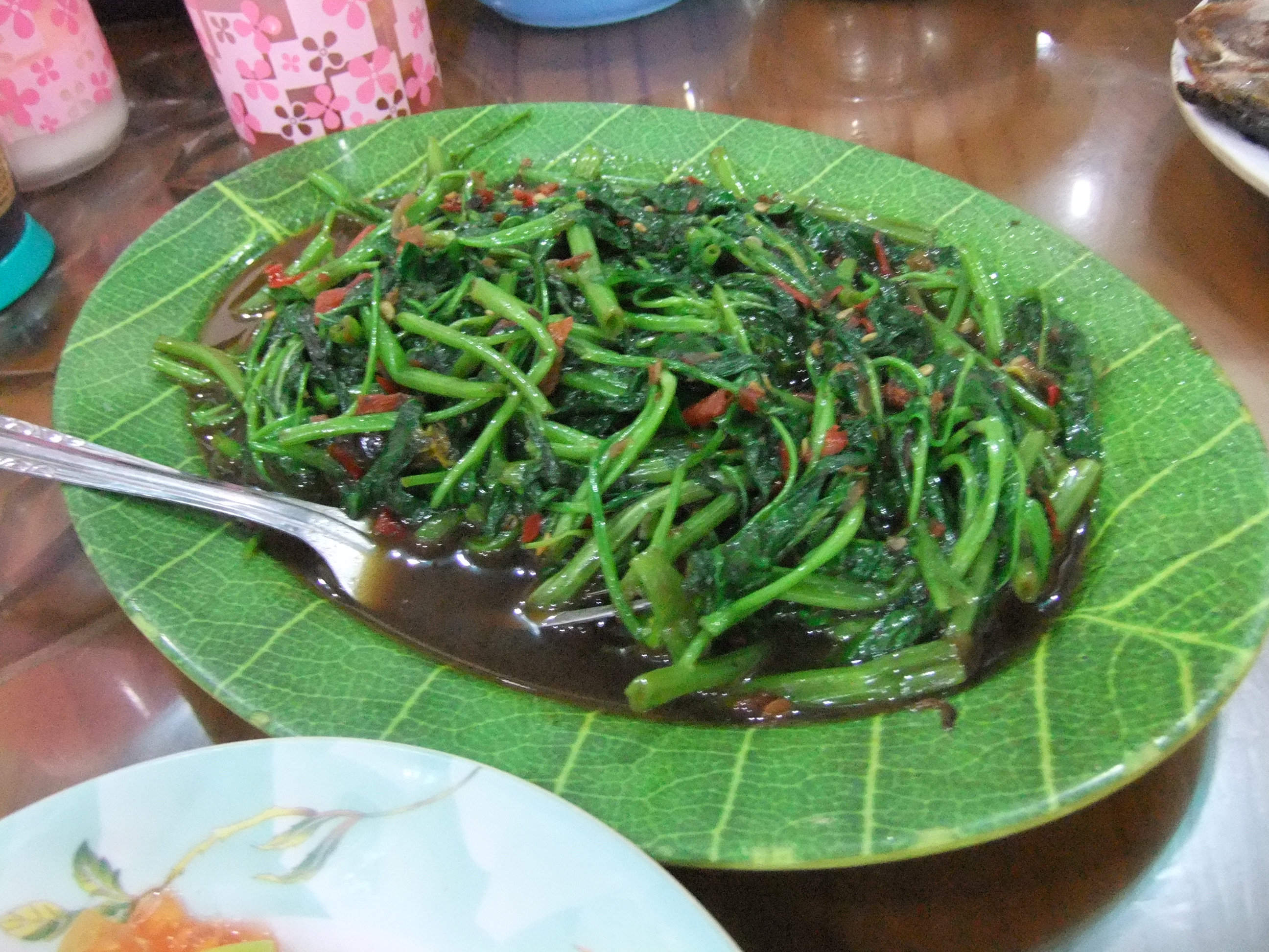 Kangkung cah terasi di Parepare